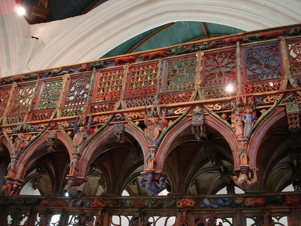 Jubé polychrome de la chapelle Saint-Fiacre Le Faouët, Morbihan Photo G. Bourrel